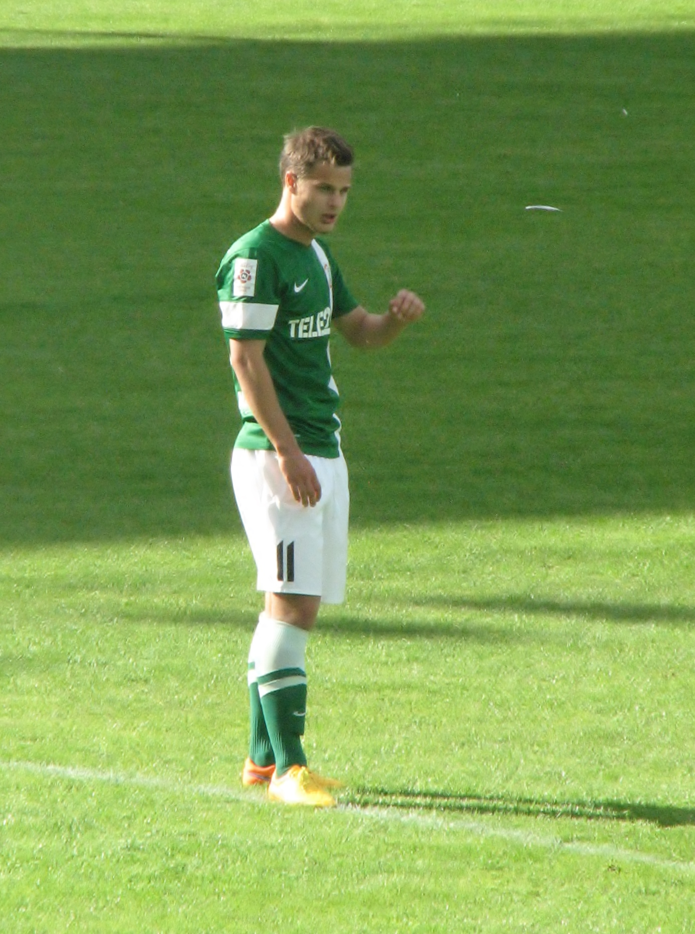 Rauno Sappinen mängimas JK Nõmme Kalju vastu